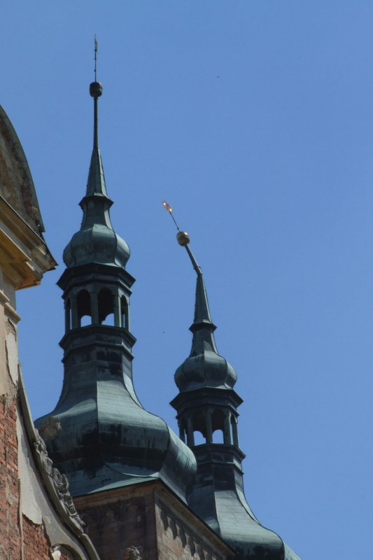 Stift Tepl - Turmhelme der Klosterkirche